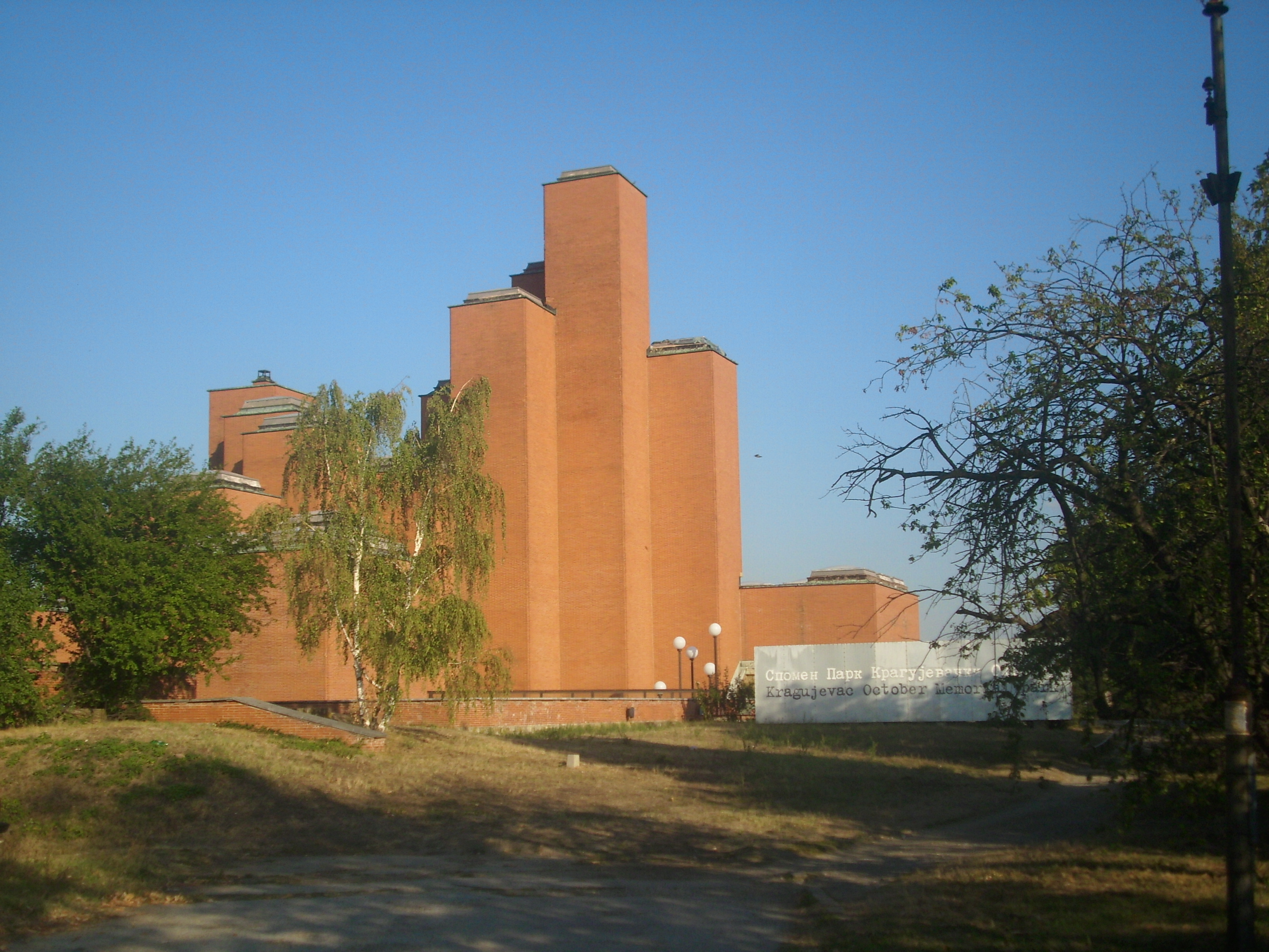 Музеј 21. октобар у Спомен-парку Крагујевачки октобар